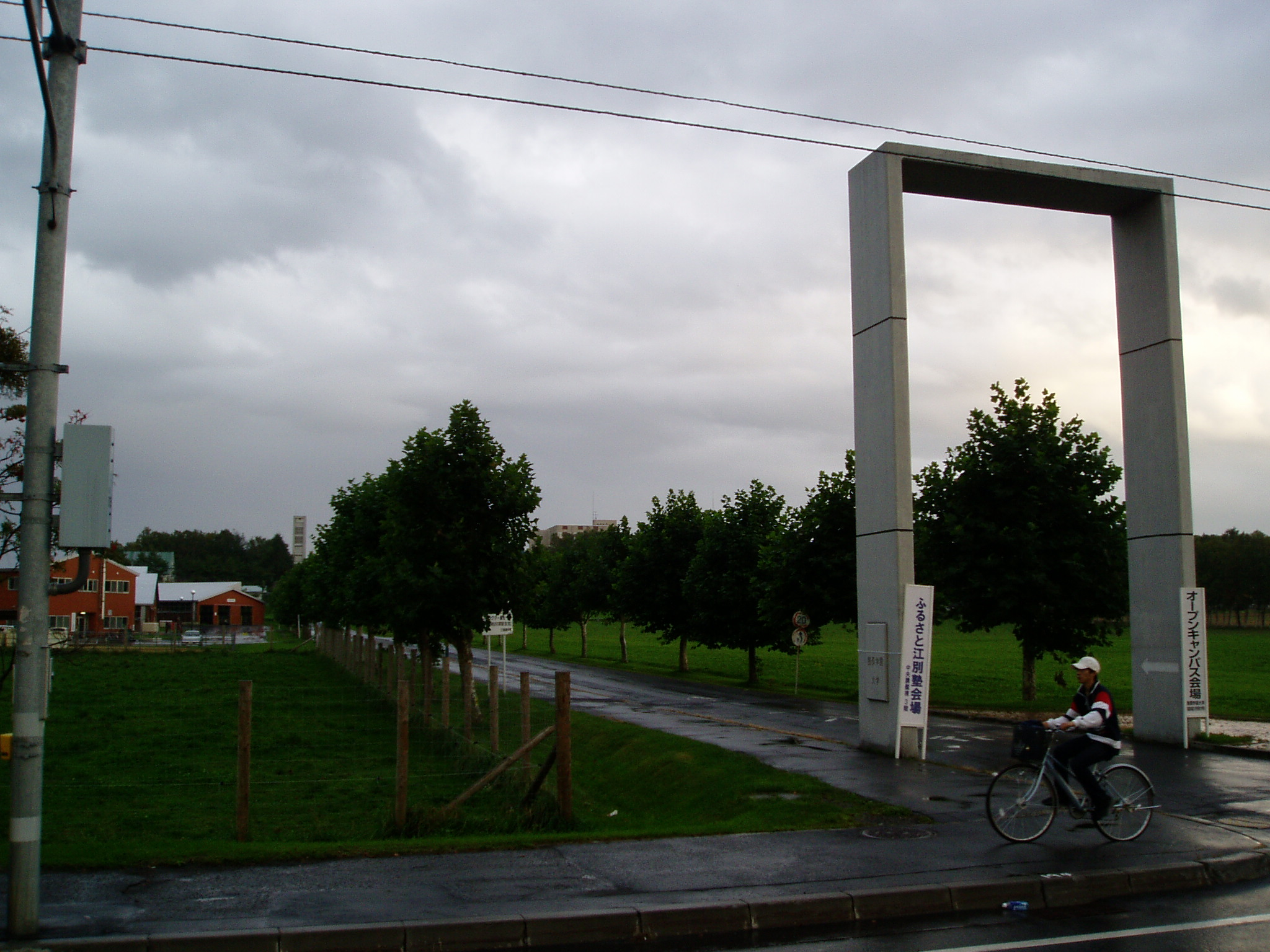 酪農学園大学キャンパス、平成17年10月10日 投稿者による撮影ja:Category:江別市の画像